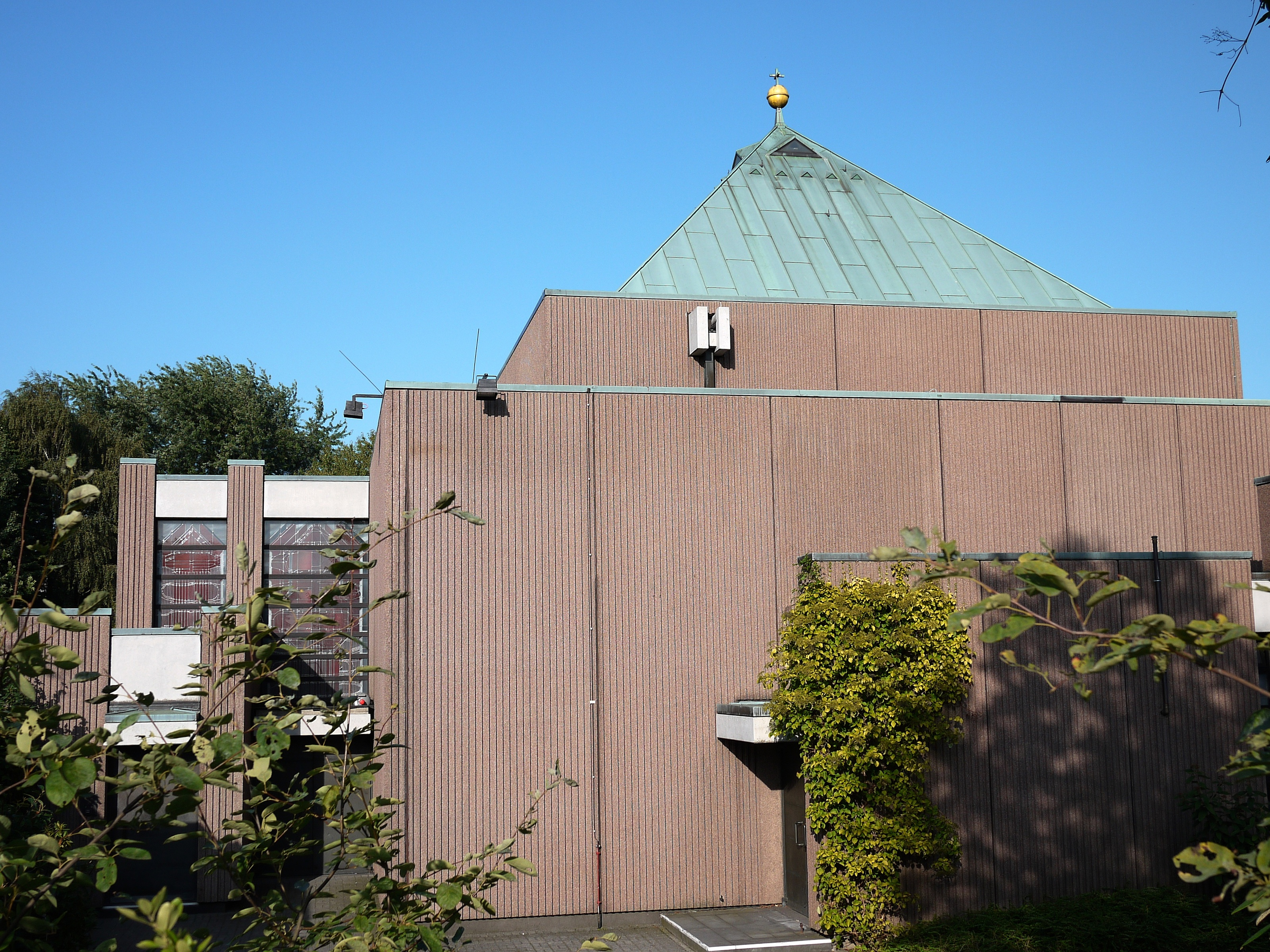 Filialkirche St. Viktor, Düsseldorf Knittkuhl, Deutschland